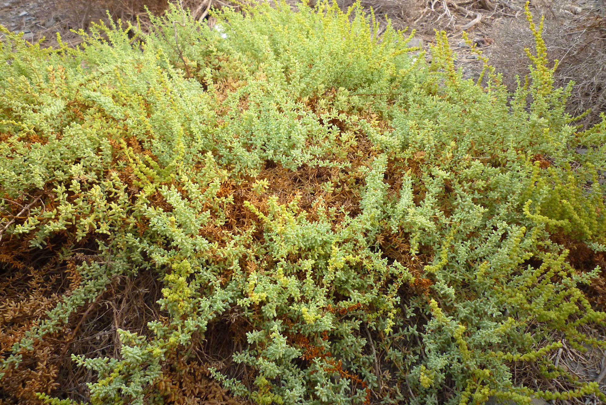 Salsola papillosa en Cala Reona, Cartagena, España.